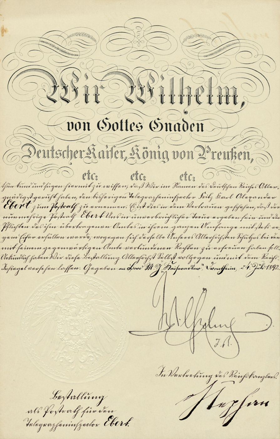 Beförderung des Telegrapheninspektors Fritz Ebert zum Postrat. Urkunde mit Unterschrift "Wilhelm R." und blindgeprägtem Majestätssiegel. Ausgestellt in Drontheim, "an Bord M. Y. 'Kaiseradler'", 4. VII. 1892. Gegengezeichnet - in Vertretung des Reichskanzlers - vom Generalpostmeister und späteren Staatsminister Heinrich von Stephan.